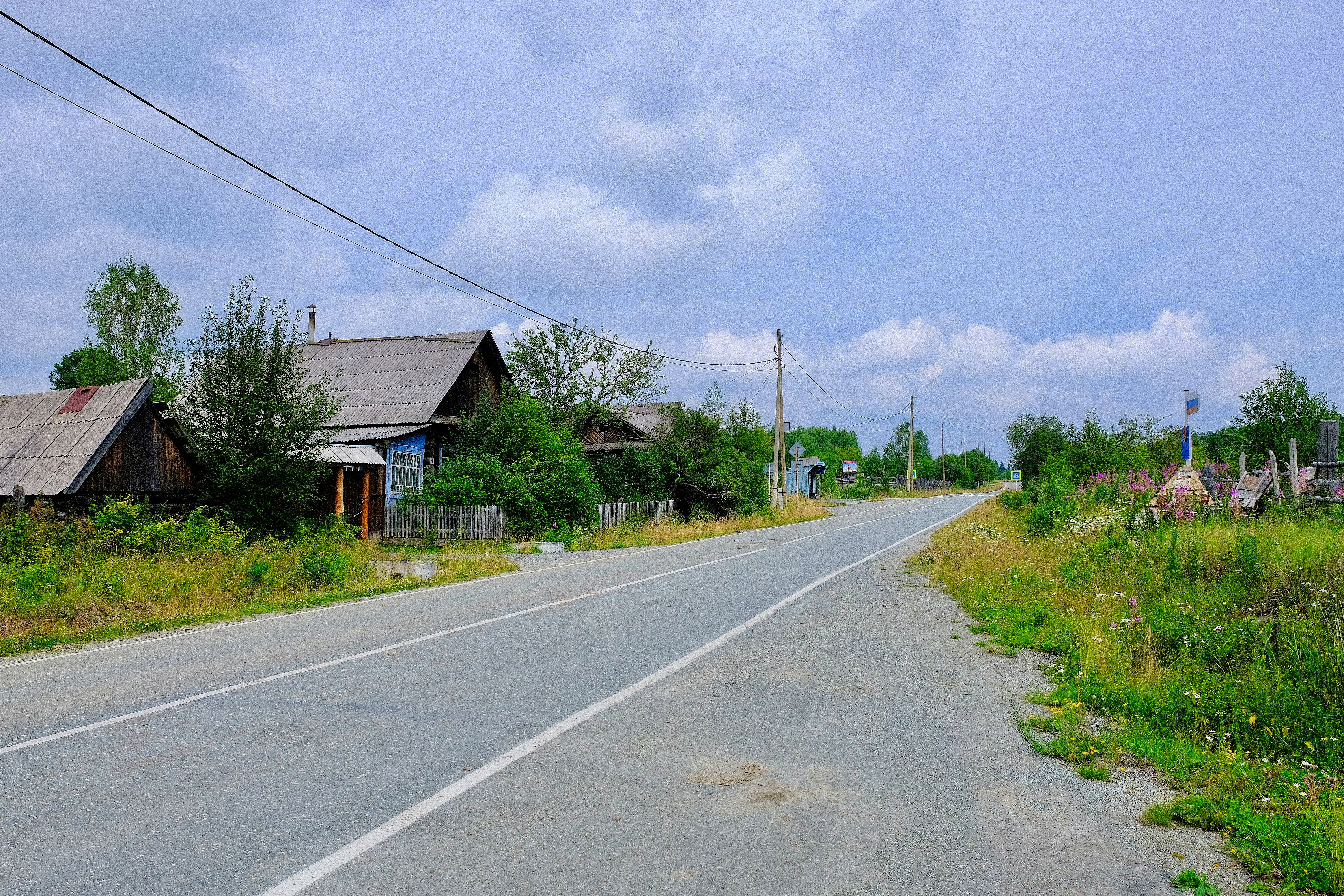 Посёлок Верхний Ис в Нижнетуринском районе Свердловской области